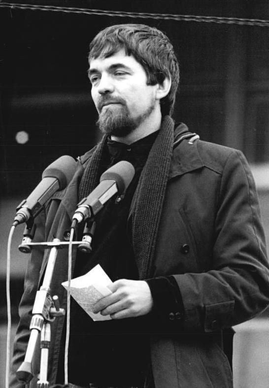 ADN-ZB Link 4.11.89 Berlin: Demonstration- 500.000 Bürger beteiligten sich an einer Demonstration für den Inhalt der Artikel 27 und 28 der Verfassung der DDR. Auf dem anschließenden Meeting auf dem Alexanderplatz ergriff auch der Dozent für Theologie der Predigerschule "Paulinum", Konrad Elmer, das Wort.